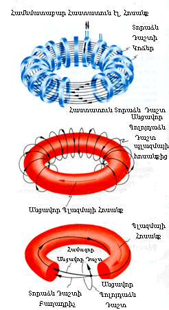 PD